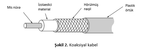 Koaksiyal kabel